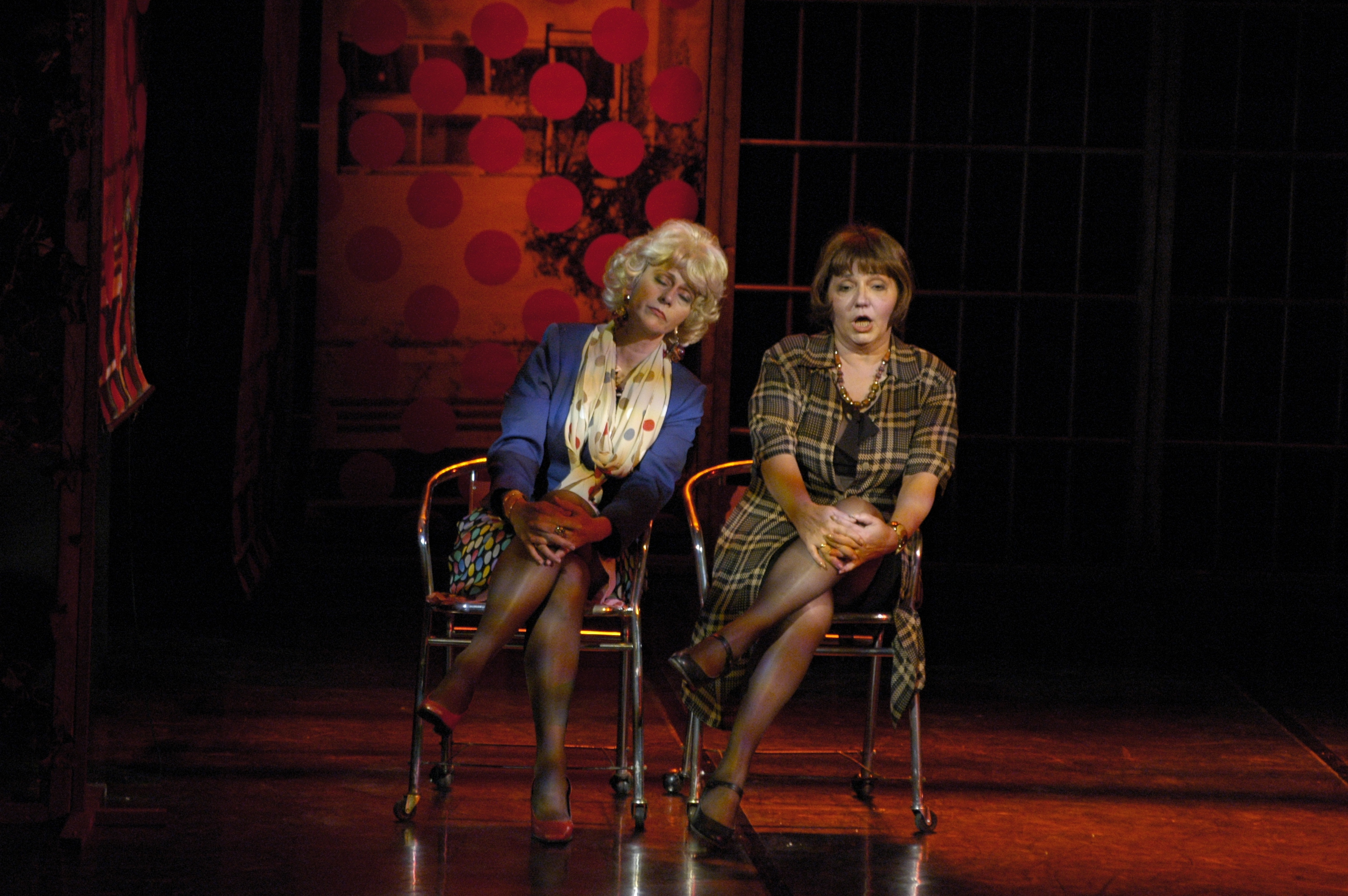 Elizabeta Djorevska i Ljiljana Stjepanovic - Predstava "Dva mirisa ruže"